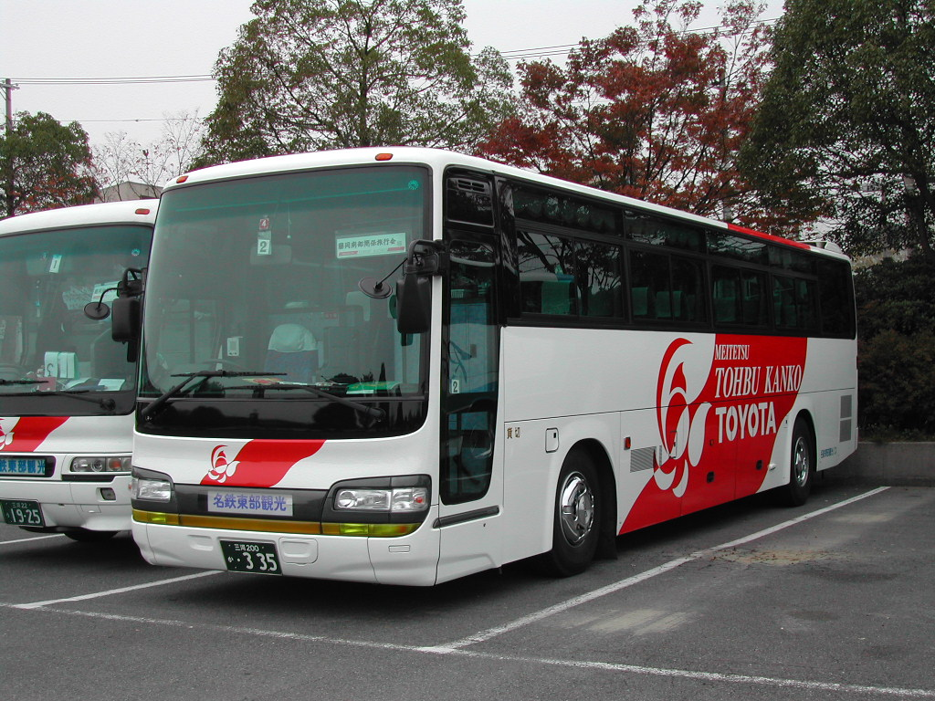 姫路城貸切バス駐車場にて 2003-11-24撮影